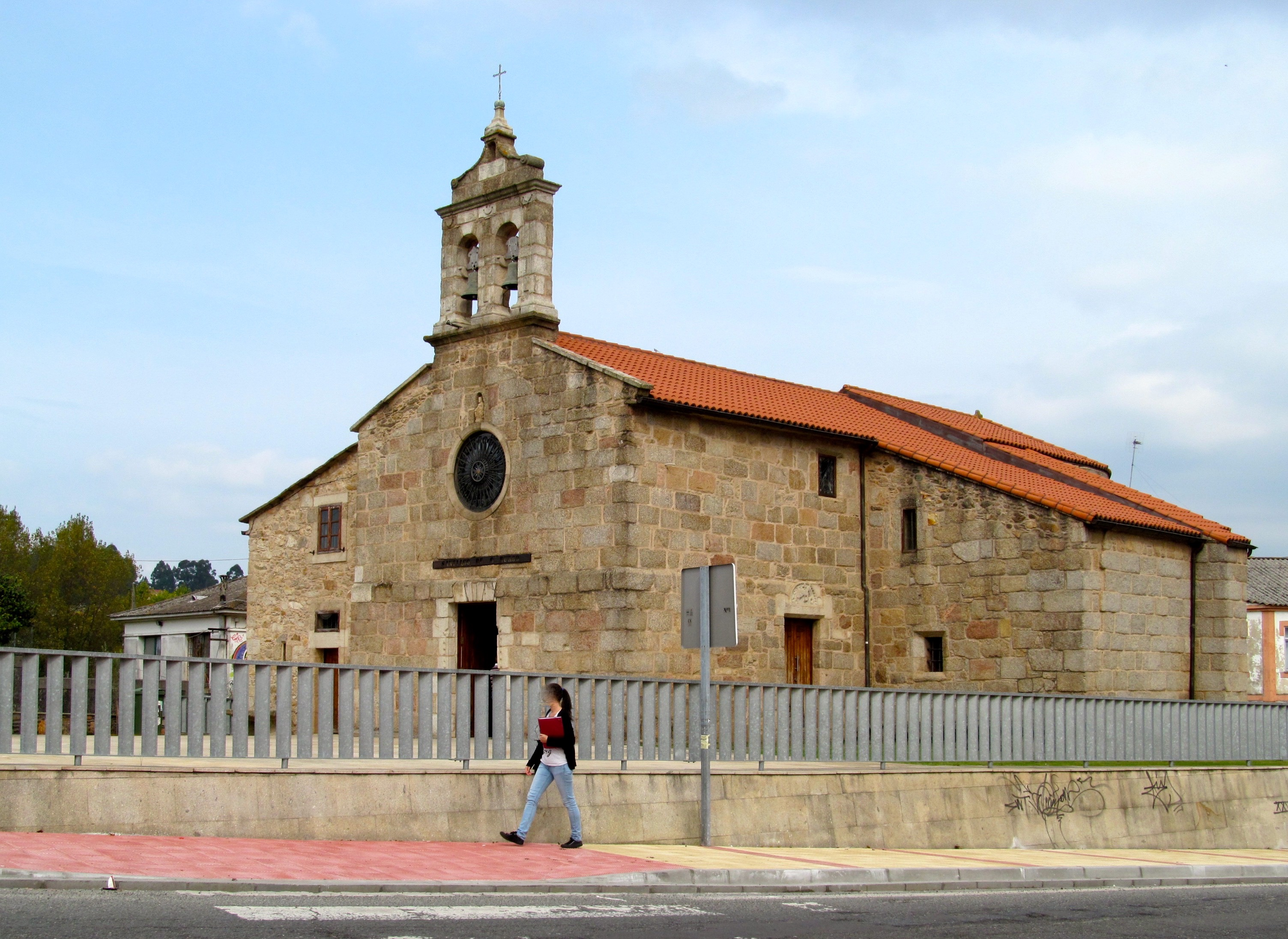 Culleredo - Iglesia parroquial de Santiago de O Burgo, data del siglo XI y es de estilo románico, en Culleredo (A Coruña), Galicia, España.